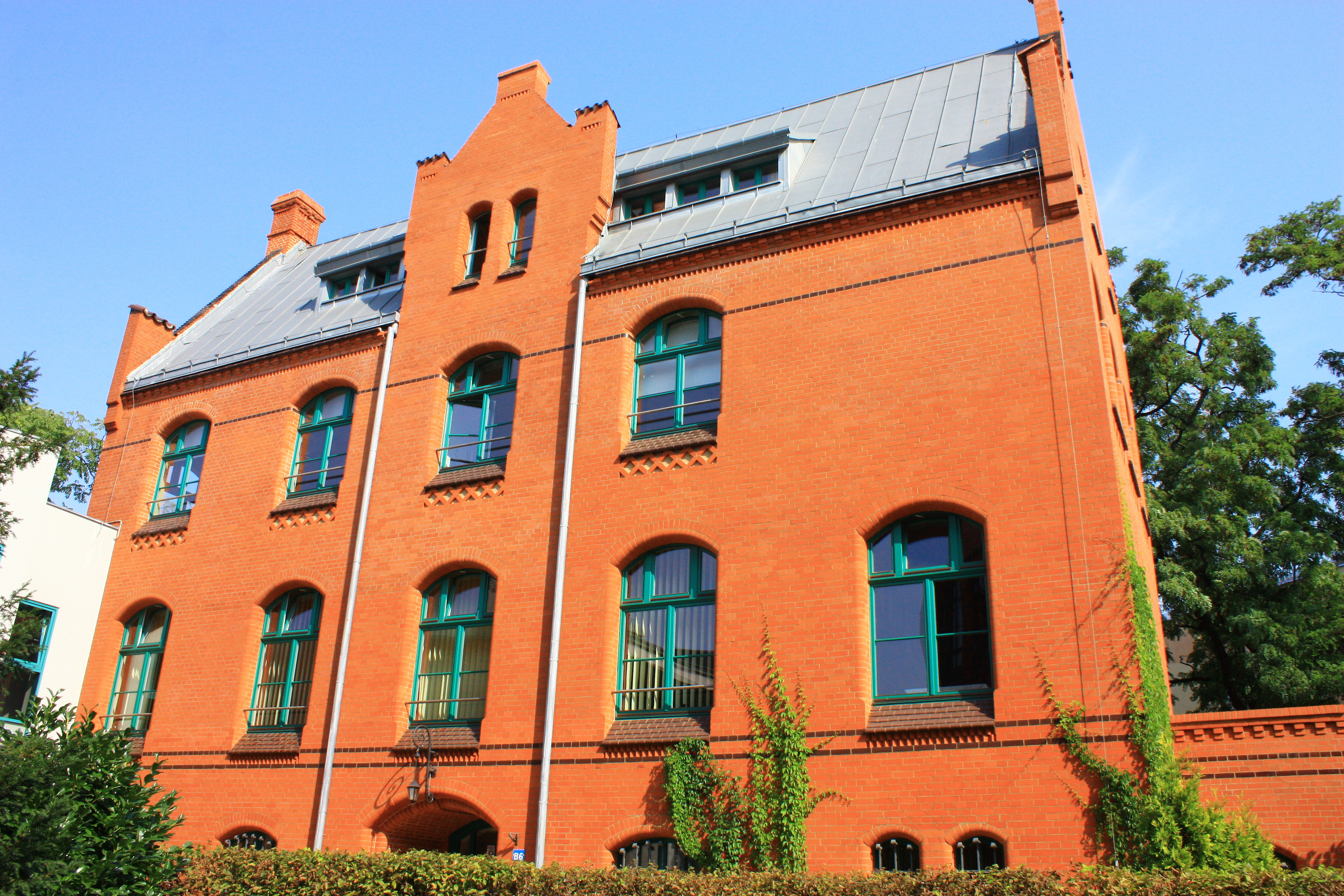 Wrocław, Zakład Medycyny Sądowej